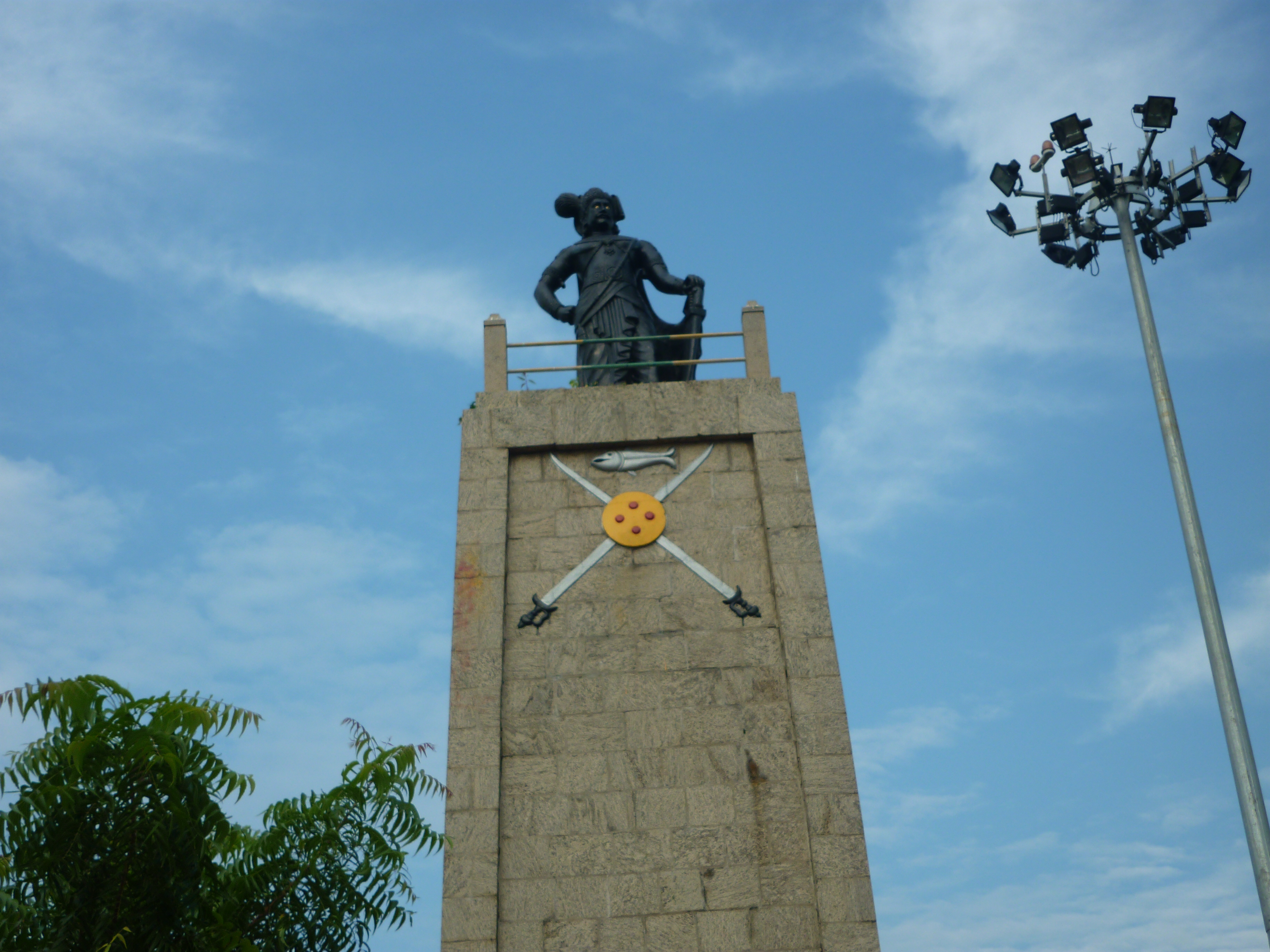 வீர பாண்டிய கட்டபொம்மன் நினைவிடம் -கயத்தாறு